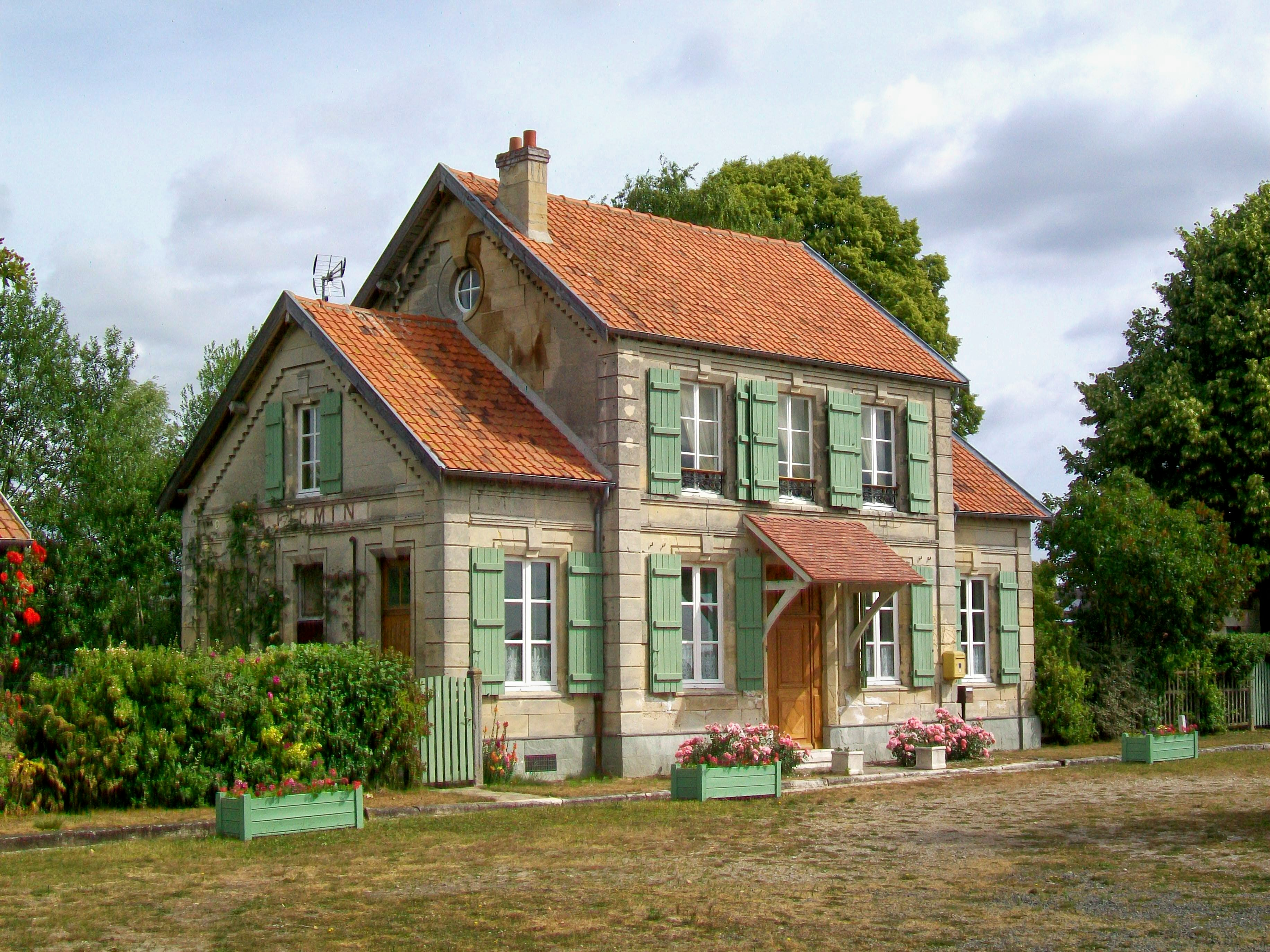 L'ancienne gare de Saint-Firmin, sur la ligne Chantilly-Gouvieux - Senlis, fermée au trafic voyageurs le 15 mai 1939. La gare a été le terminus du trafic de marchandises (depuis Senlis) entre 1960 et 1971, année de sa fermeture définitive.